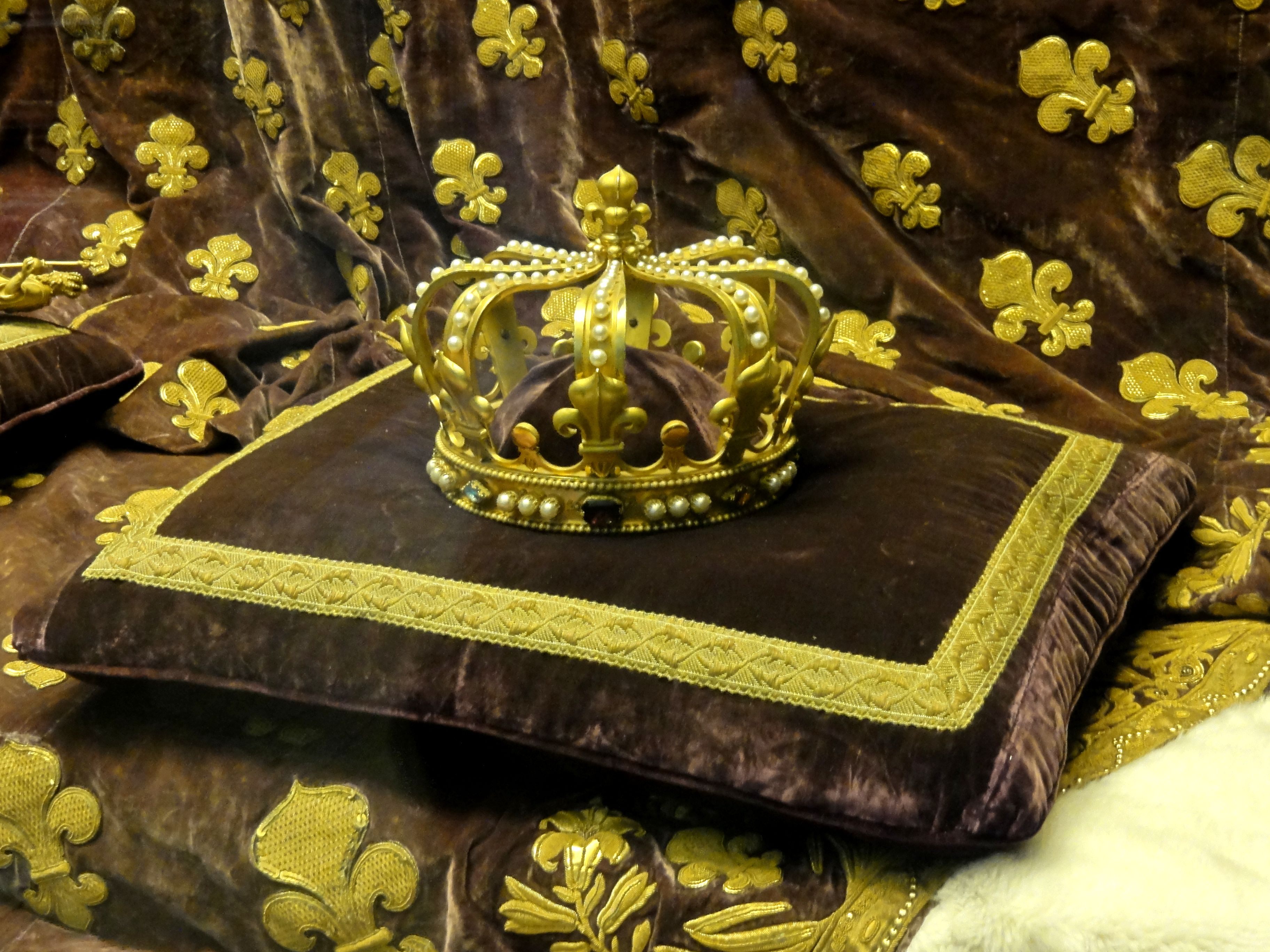 Couronne royale dite de la reine, exécutée par Feuchères sur un dessin de Hittorf.